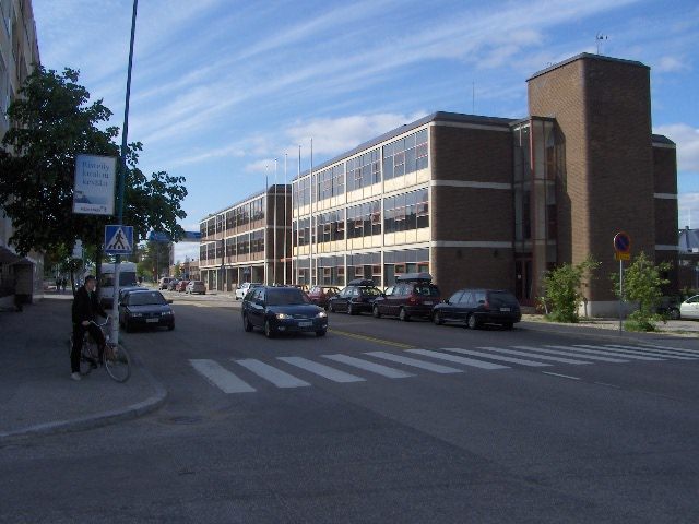 Kajaanin kaupungintalo